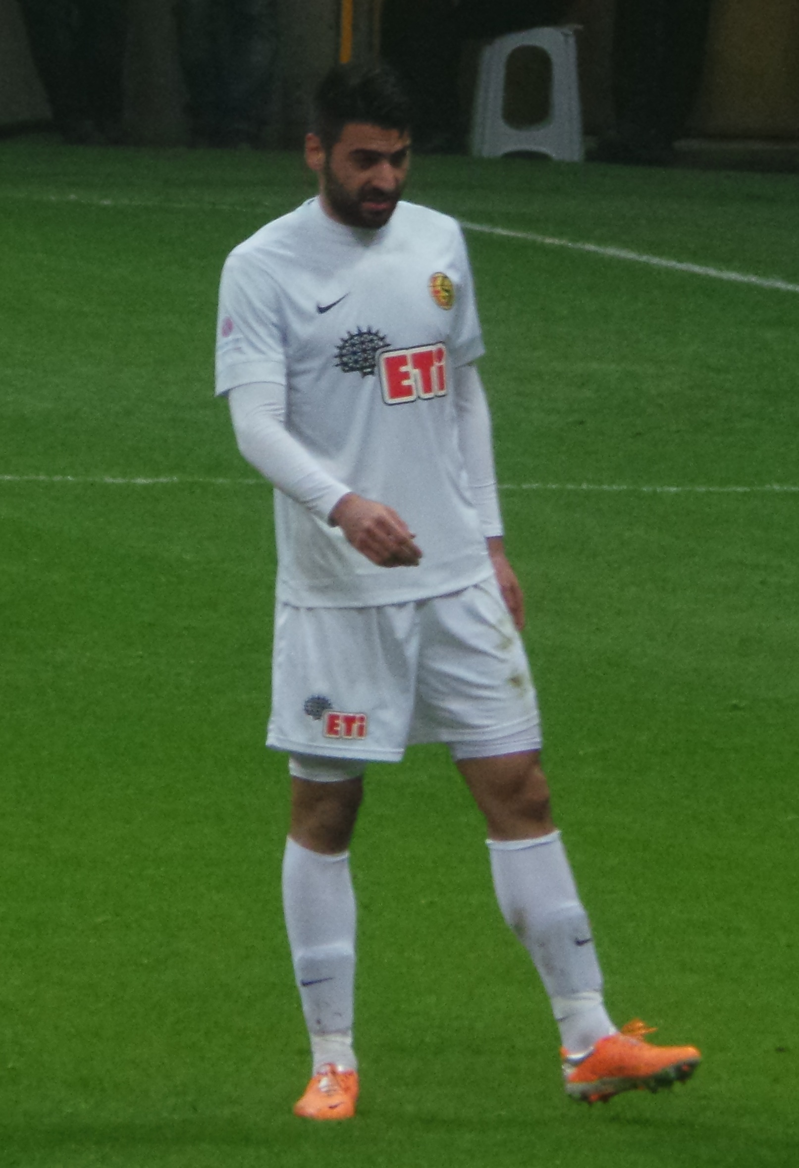 Mirkan Aydin